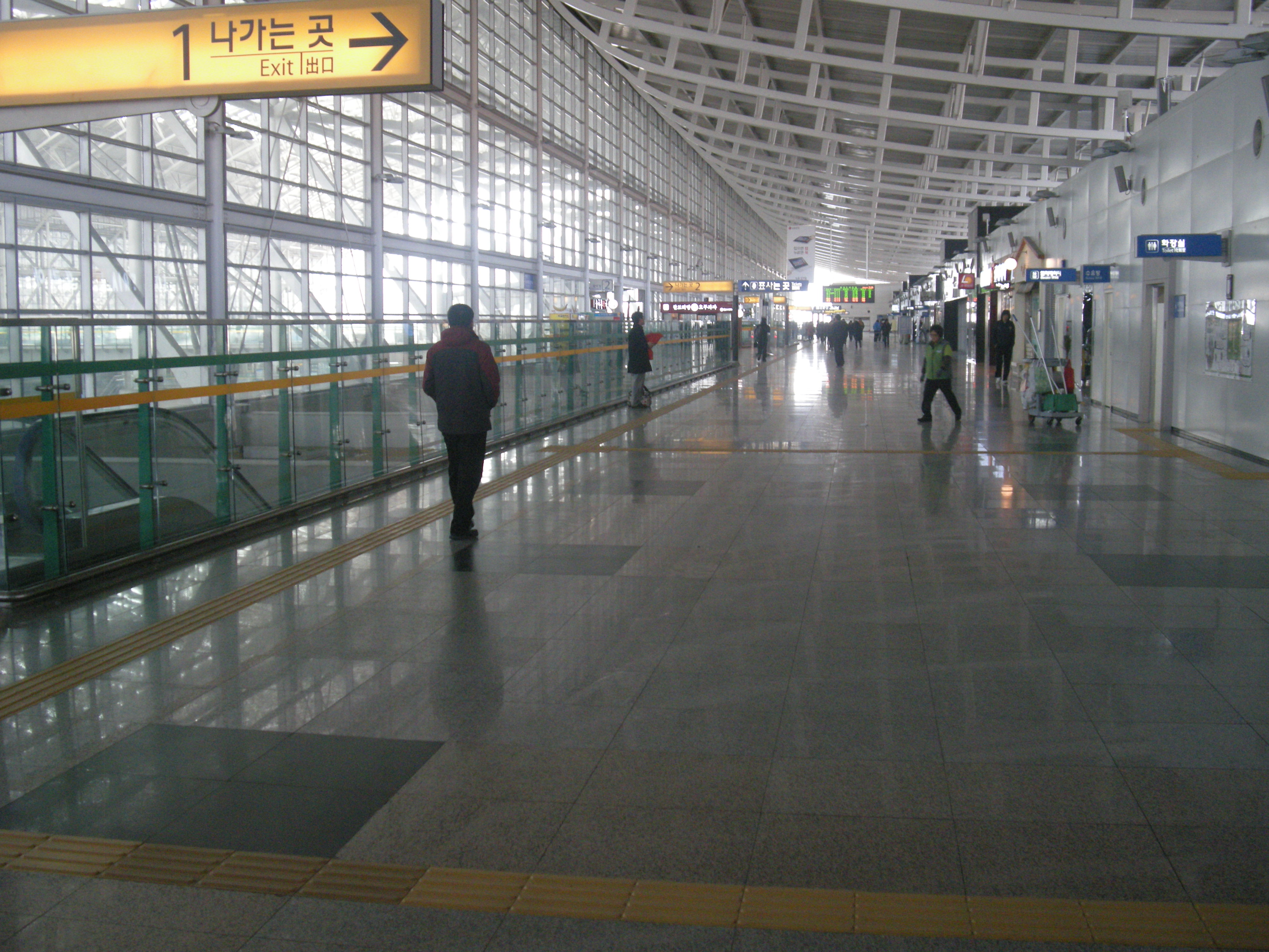 한국고속철도 광명역 서부 맞이방